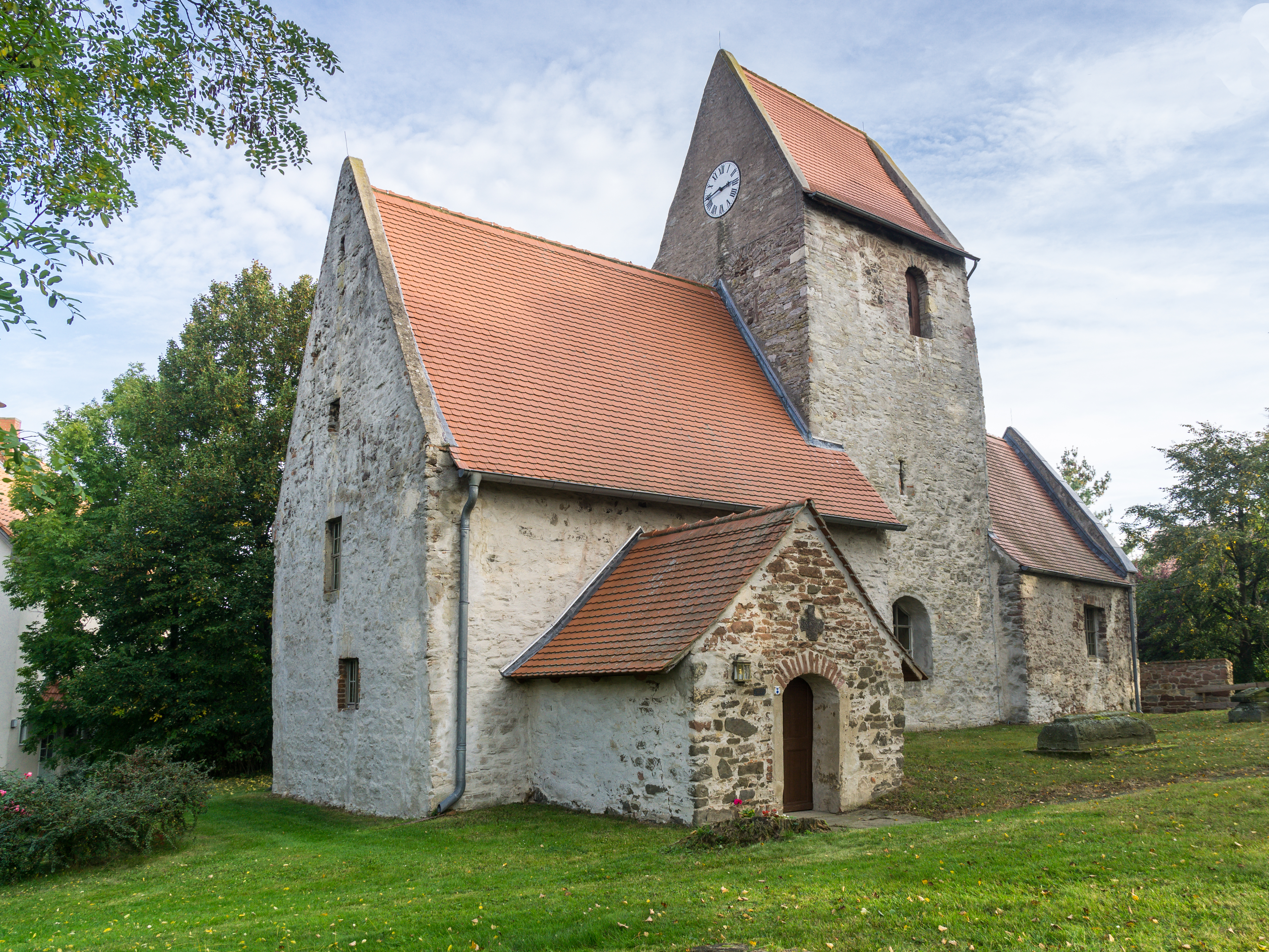 St. Marienkirche Dorfstraße 12 in Erxleben OT Groppendorf